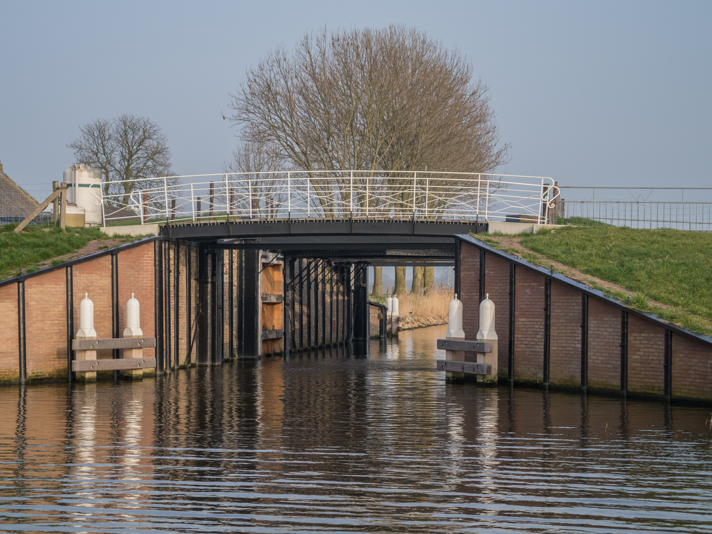 Opgeknapte Wetsingerzijl